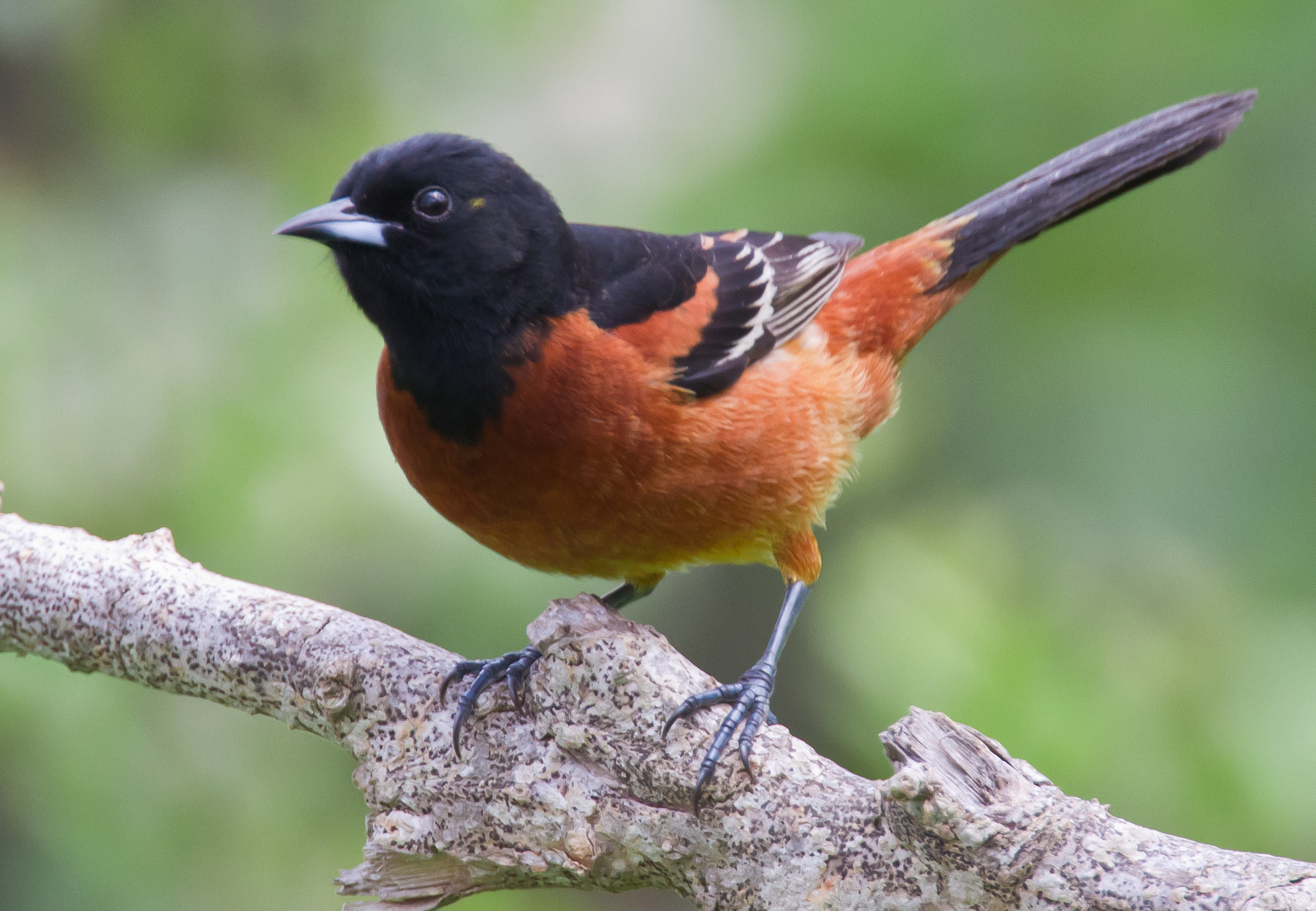 Orchard Oriole